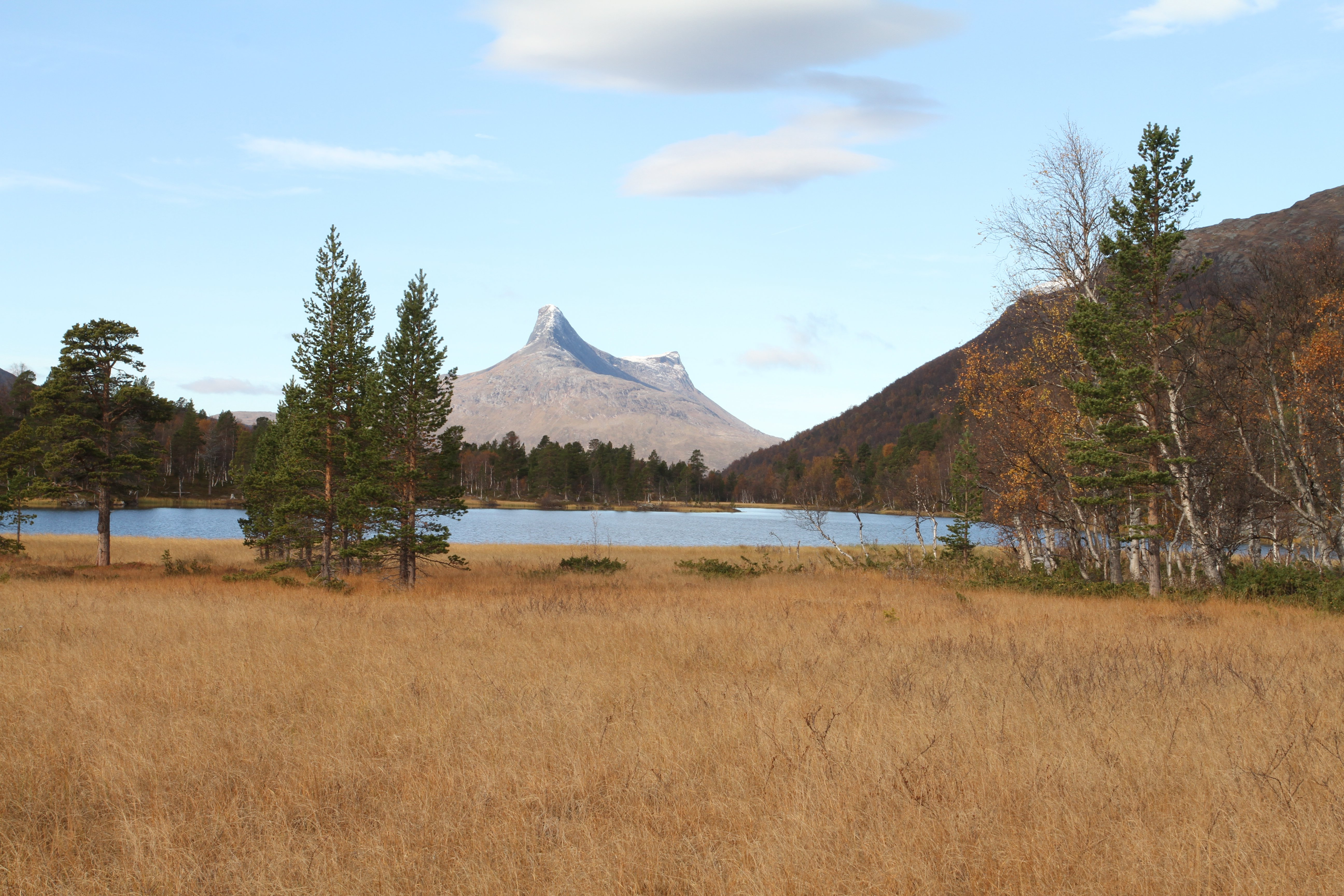 Stor Graddis i øvre deler av Junkerdal, Saltdal kommune i Nordalnd fylke.